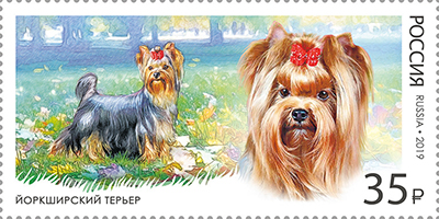 Почтовая марка России, выпущенная 28 февраля 2019 года, из серии «Декоративные породы собак». На марке изображён йоркширский терьер. Дизайнер — О. Савина. Номер по каталогу — 2448.